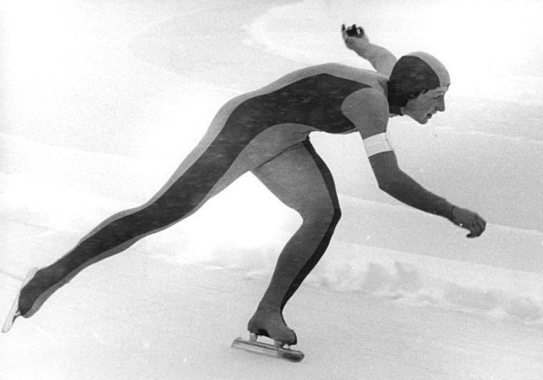 Christa Rothenburger ADN-ZB Thieme 12.2.1983-tra-Karl-Marx-Stadt: DDR-Meisterschaften im Eissprint auf der Bahn im Küchwald. Nach dem ersten Wettkampftg führt die Sprinterin Christa Rothenburger (SC Einheit Dresden) über 500m (41,93) und 1000m (1:25,55).